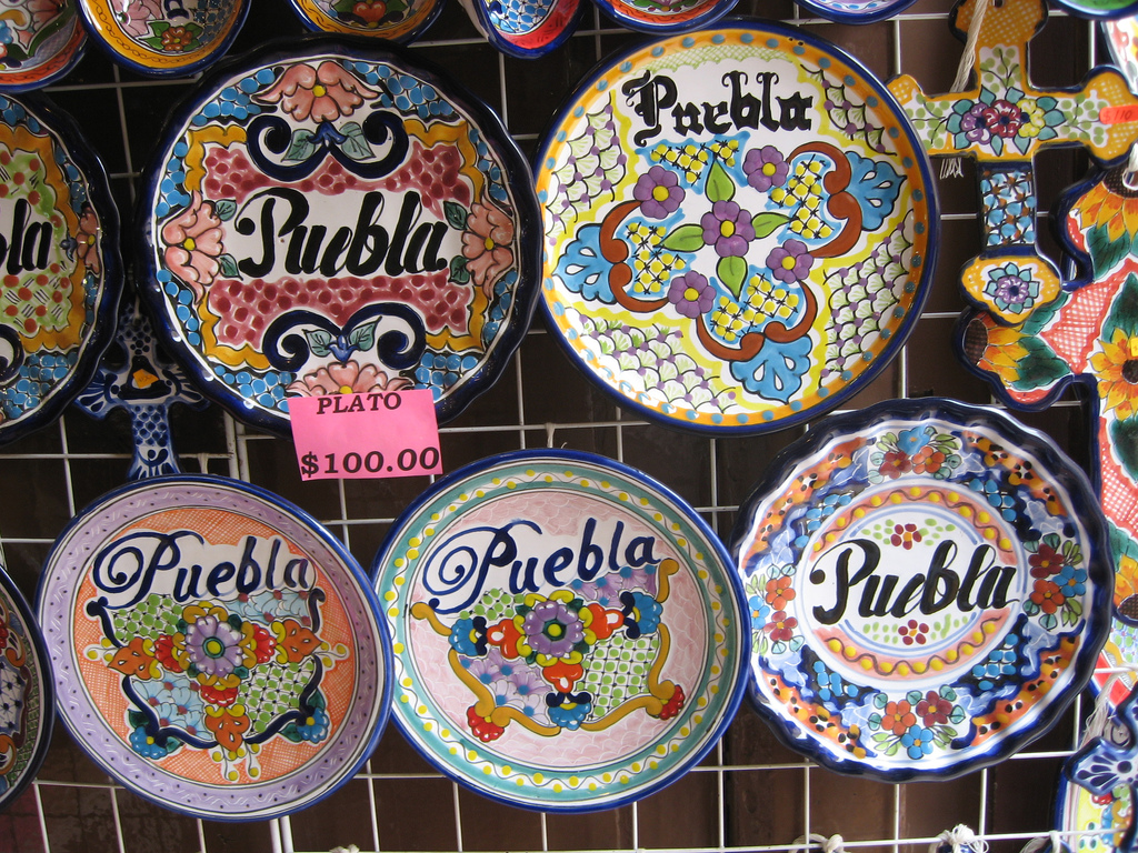 Platos policromos de cerámica en el mercado de El Parián de Puebla de Zaragoza (Mexico)